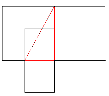 Ábra a túl egysíkúan kialakított négyzetfogalomról és ennek negatív következményeiről